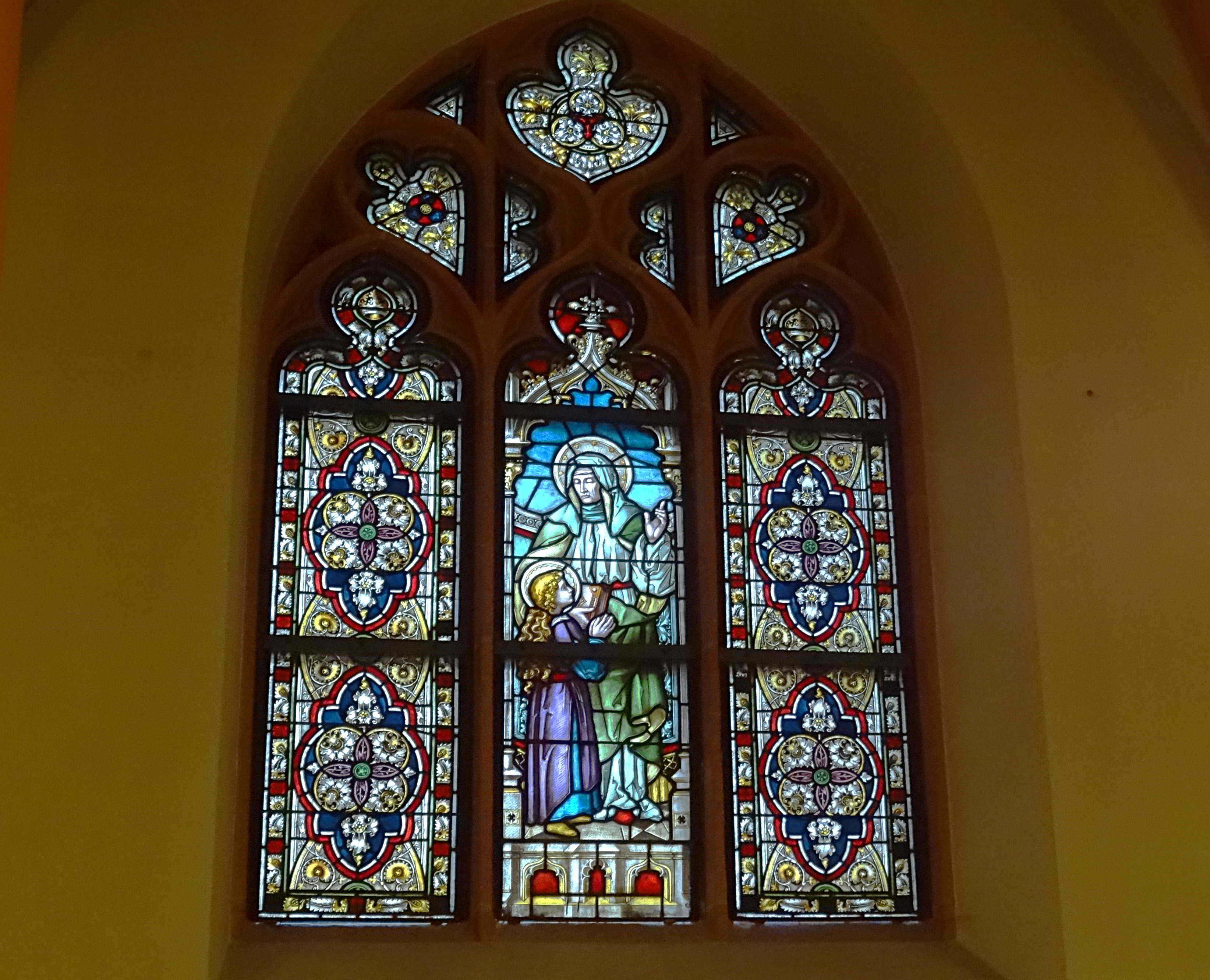 Bleiglasfenster über den Beichtstühlen in der Pfarrkirche St. Bonifatius Apolda mit Maria, der Mutter Gottes als junges Mädchen zusammen mit ihrer Mutter Anna.